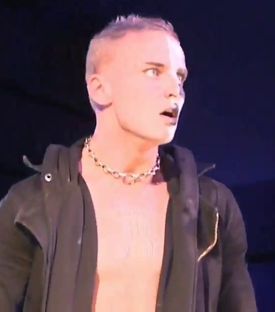 Darby Allin lors de Evolve 100